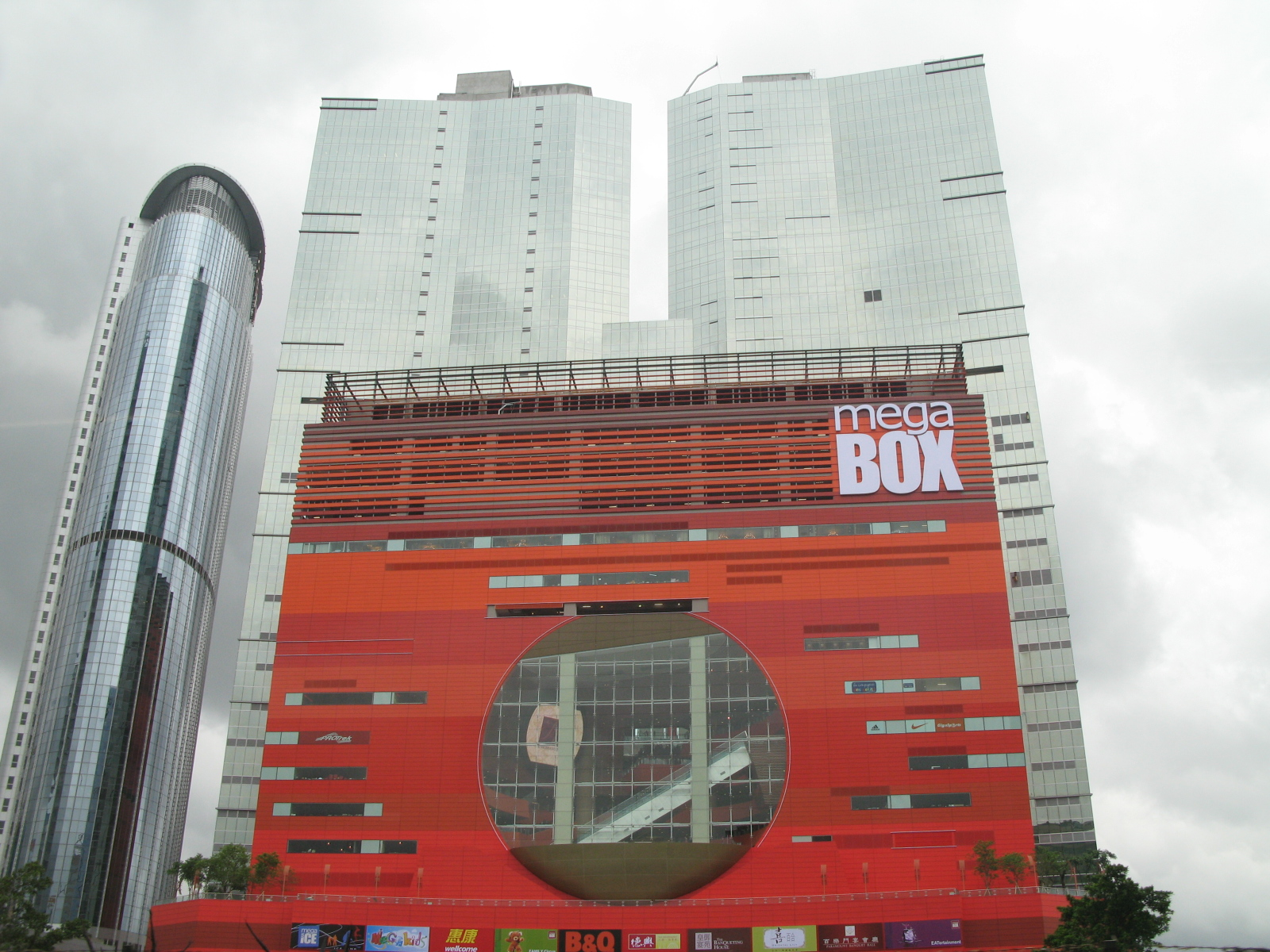 Megabox Outside View 2007/06